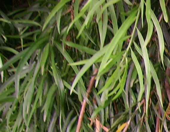 Hojas de un árbol de mañío de hojas largas (Podocarpus salignus), Valdivia, Chile.